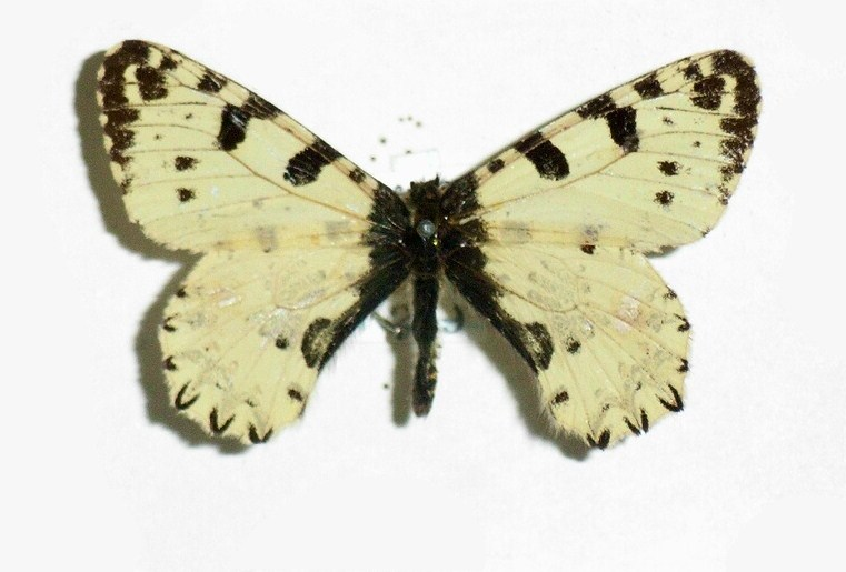 Allancastria cretica